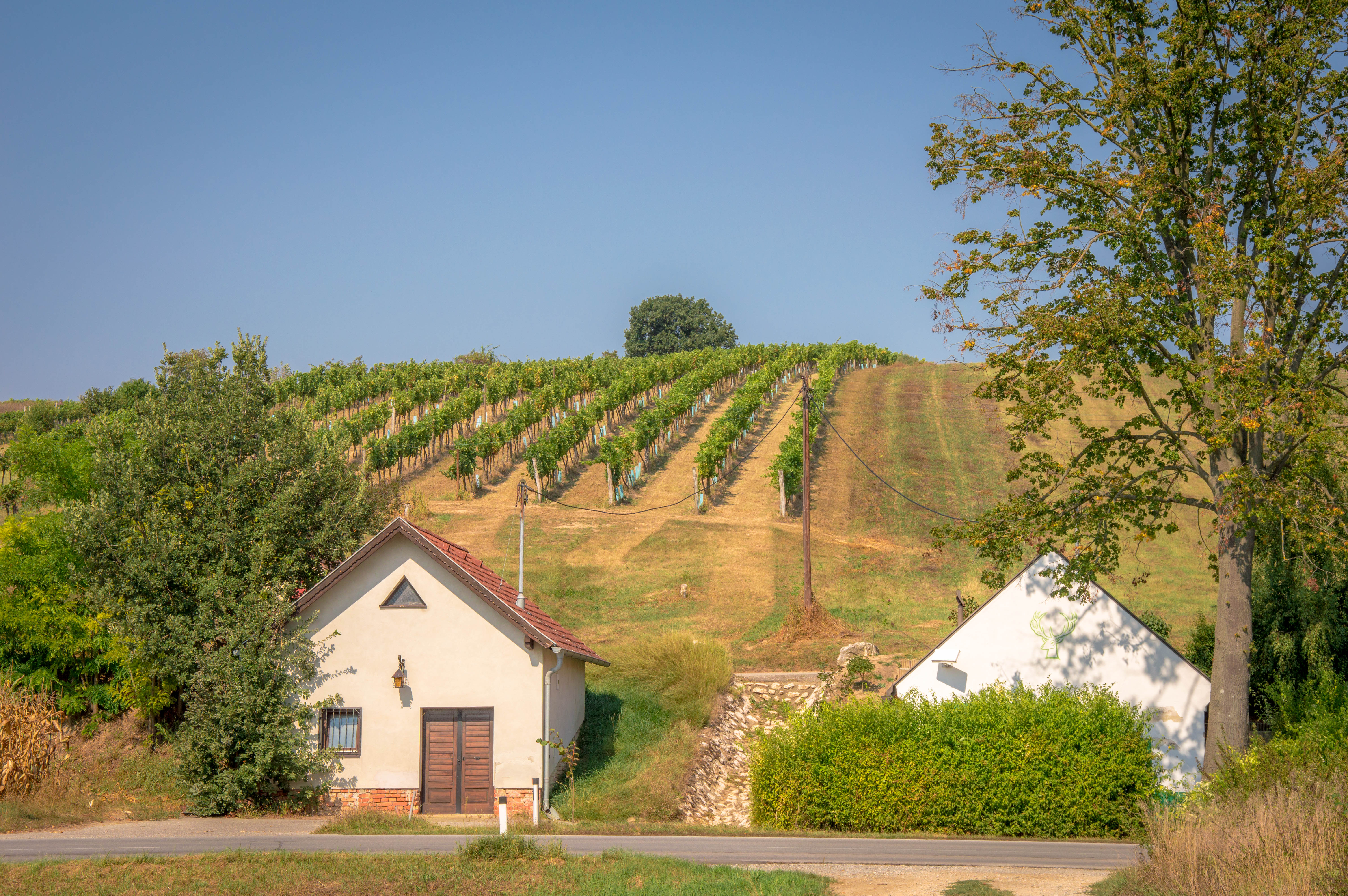 Kellergasse Kellergasse/„Protteser Straße“ in der KG Ebenthal in Ebenthal